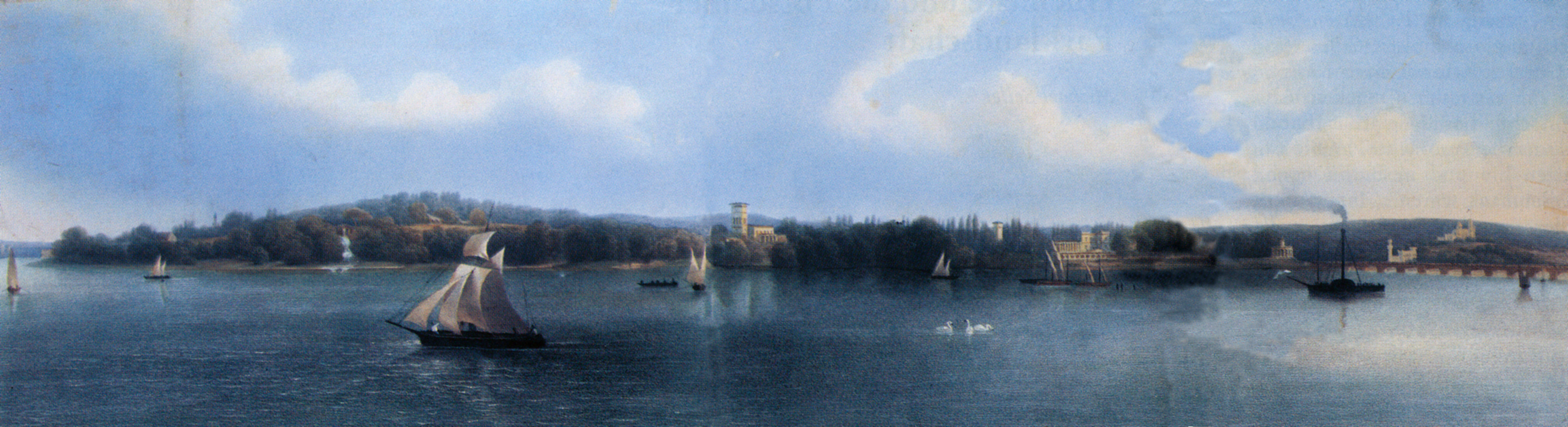 August Haun nach Wilhelm Schirmer Klein Glienicke Uferpartie, Farblithografie um 1840